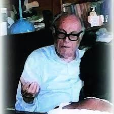 Vinci Verginelli riceve i suoi amici nel suo studio a Roma (immagine tratta da: Enzo Tota e Vito Di Chio (vedasi voce bibliografica)